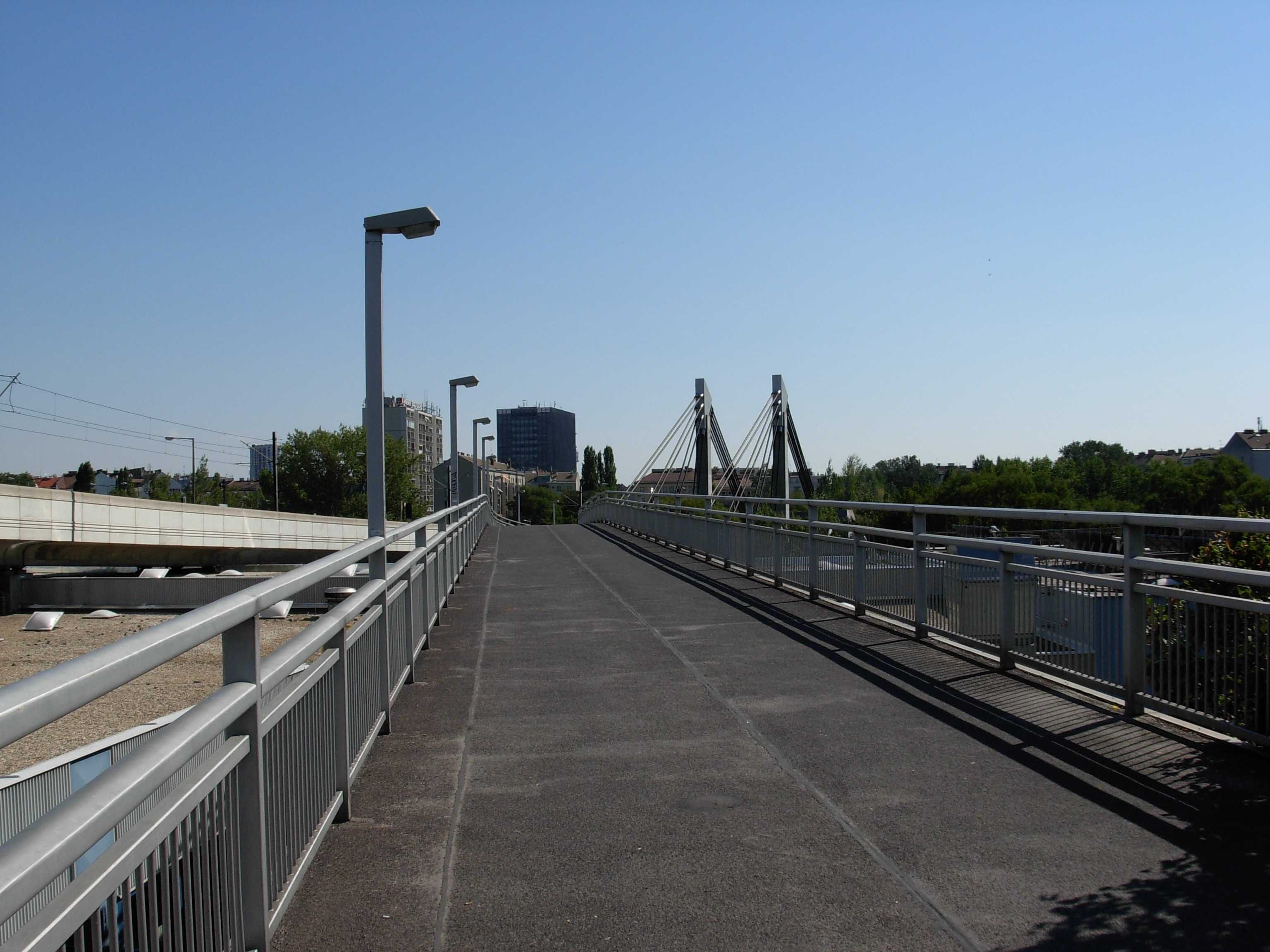 Fuß- und Radbrücke Spittelau